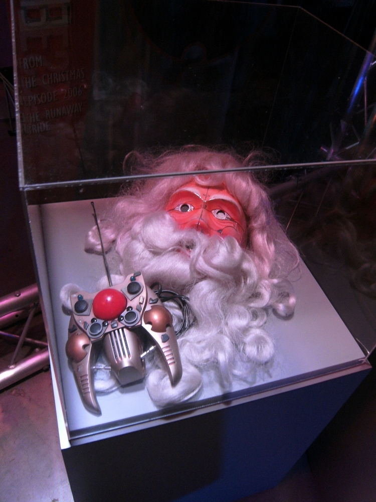 Rollei Doctor Who Experience